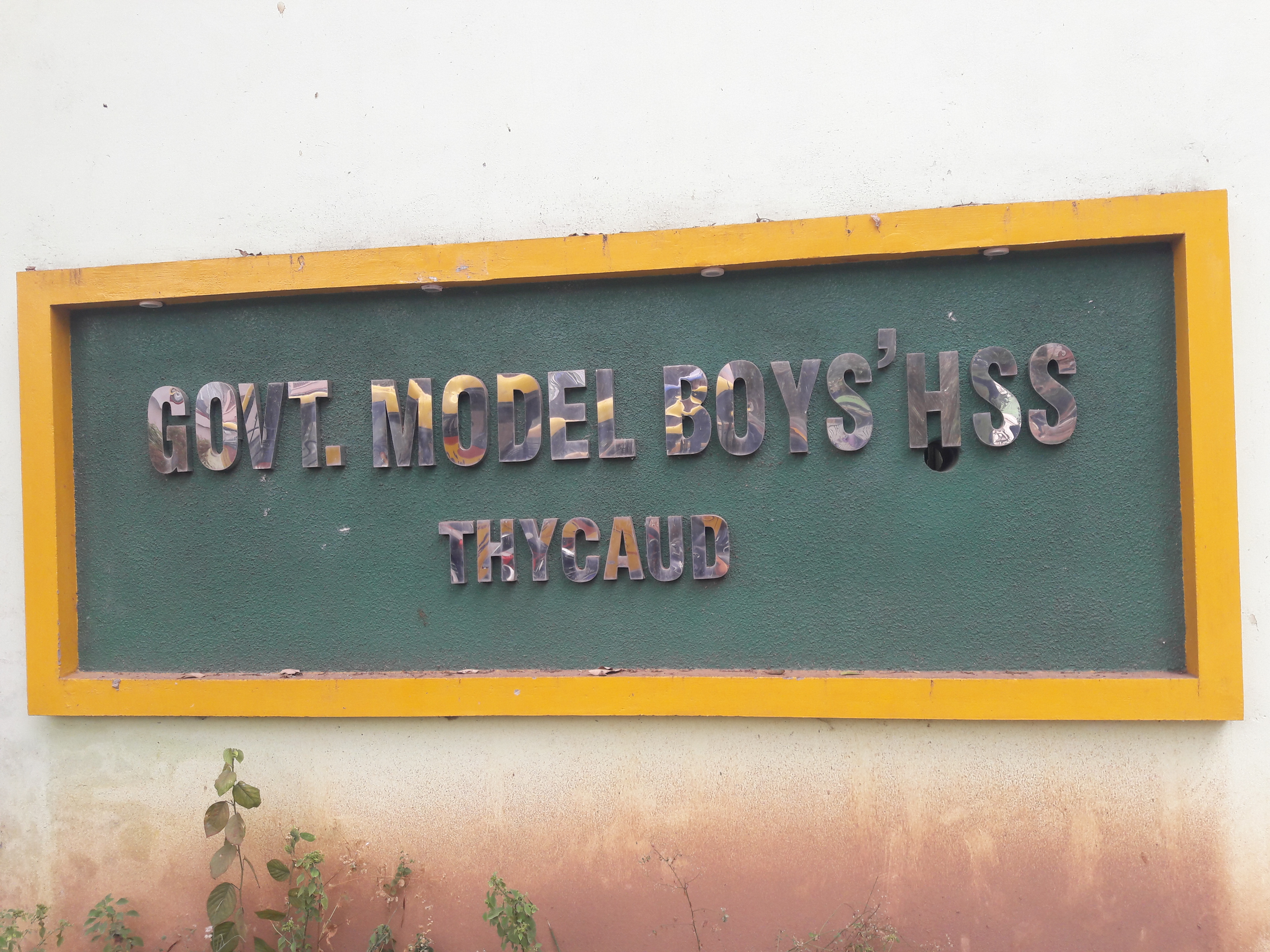 ഗവ. മോഡൽ ബോയ്സ് എച്ച്.എസ്.എസ്, തൈക്കാട് നാമ ഫലകം.